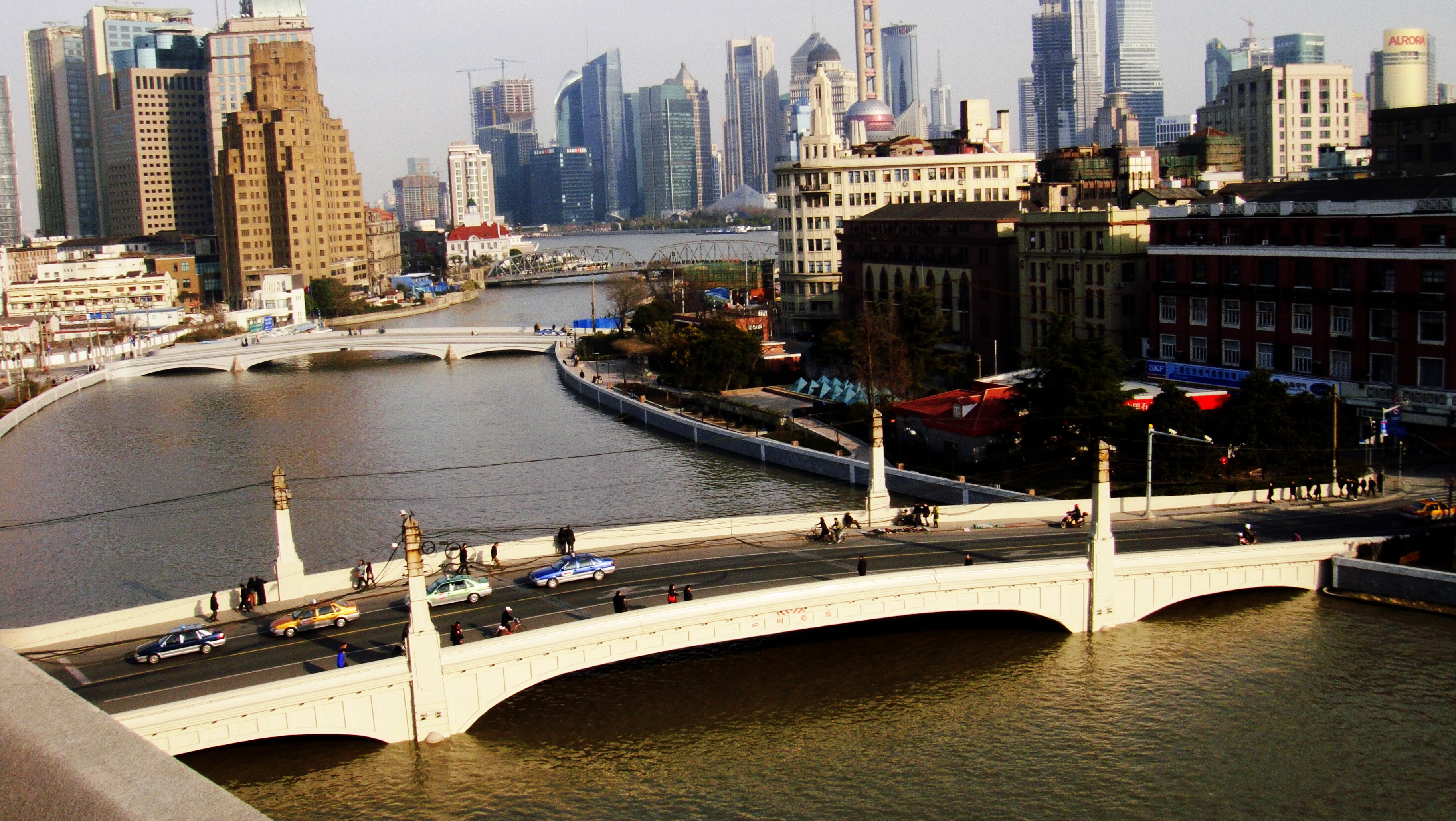 2010年的苏州河和四川路桥、乍浦路桥